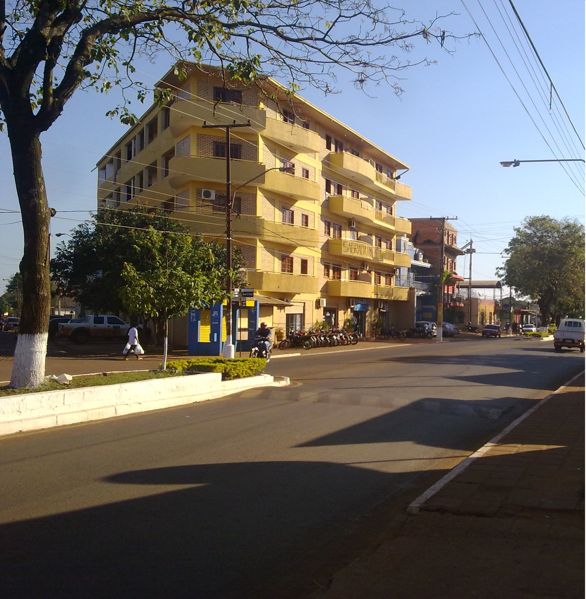 Centro de la Ciudad de Hernandarias